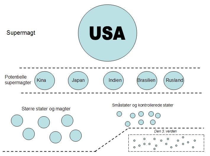 Her har vi én supermagt. Denne er ubestridt størst i økonomi og militær.